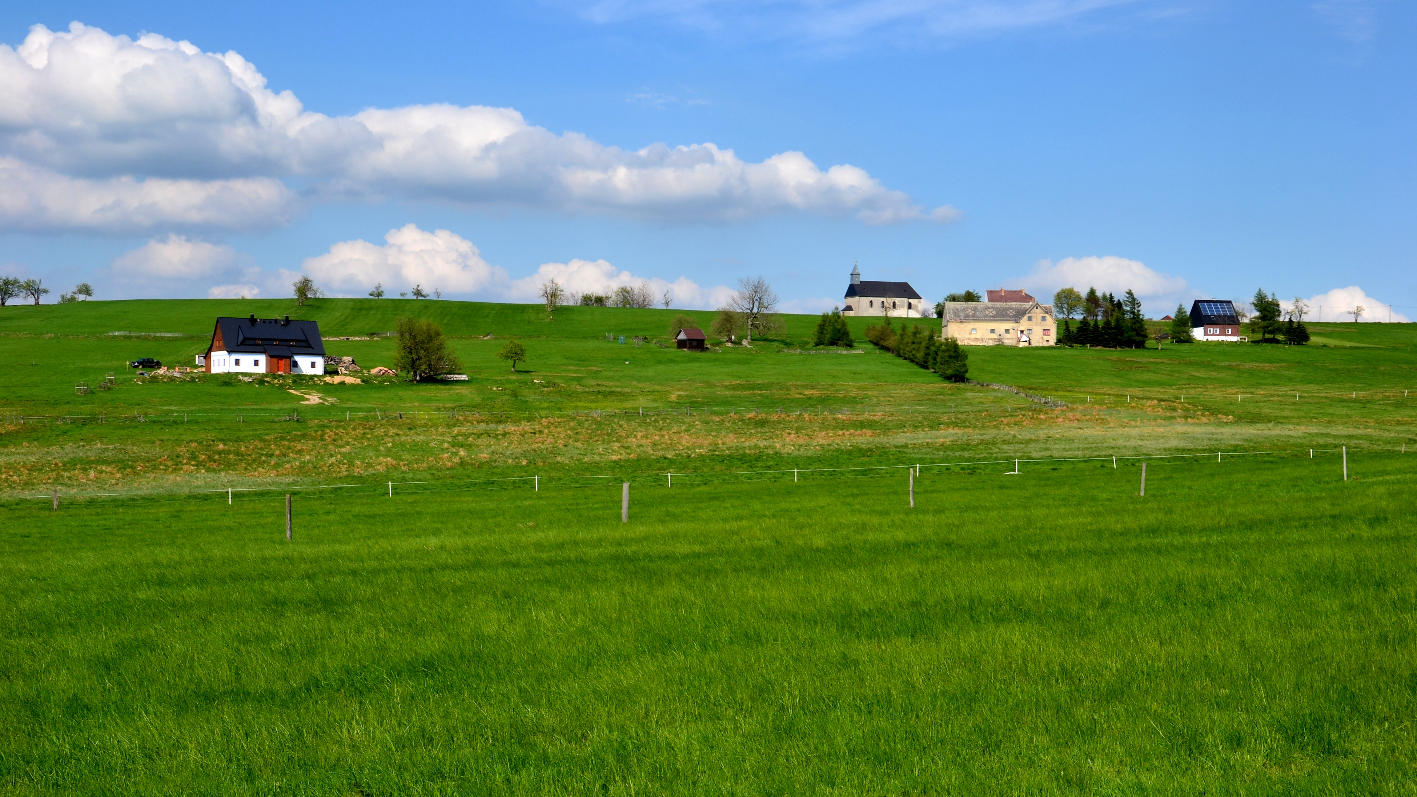 Malý Háj (pohled z Rudolic v Horách)